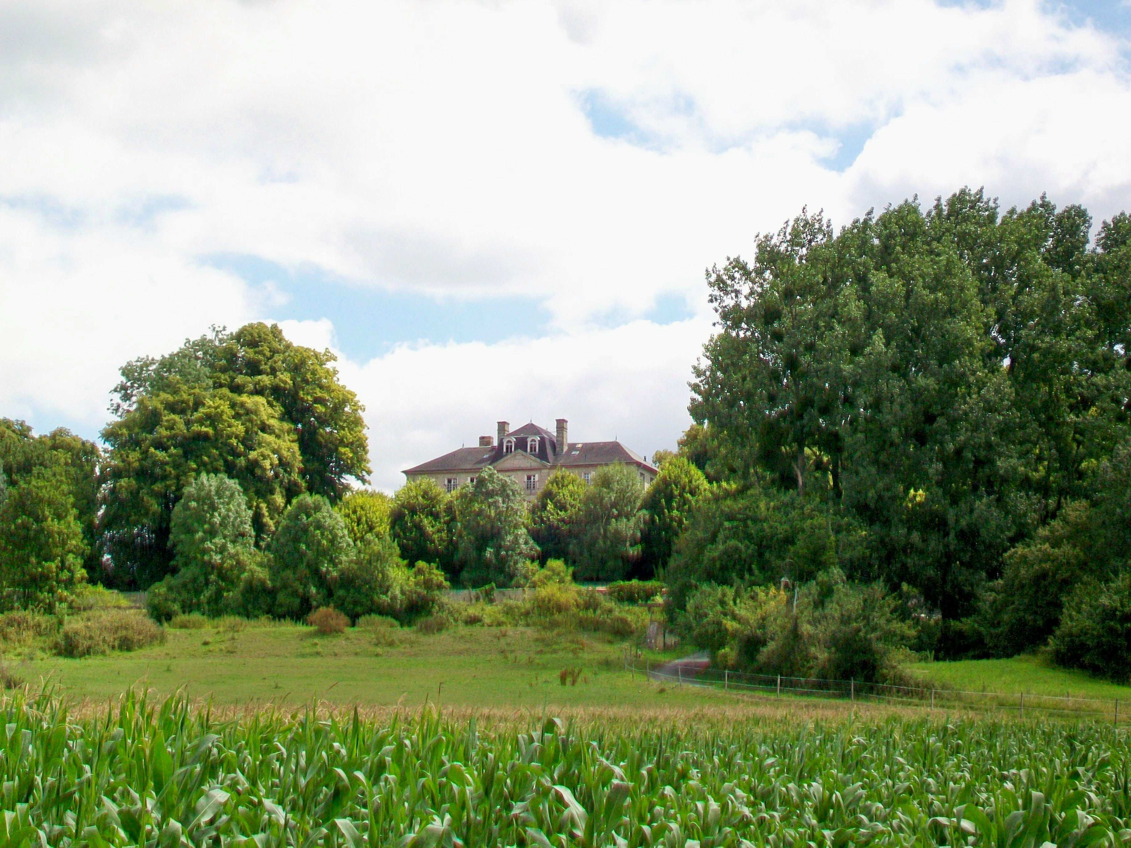 Le château de Saint-Christophe, vue depuis les dernières maisons de Fleurines.